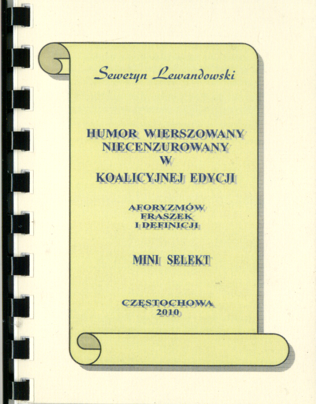 Humor wierszowany ... Mini selekt